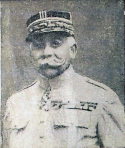 carte postale de François Anthoine.